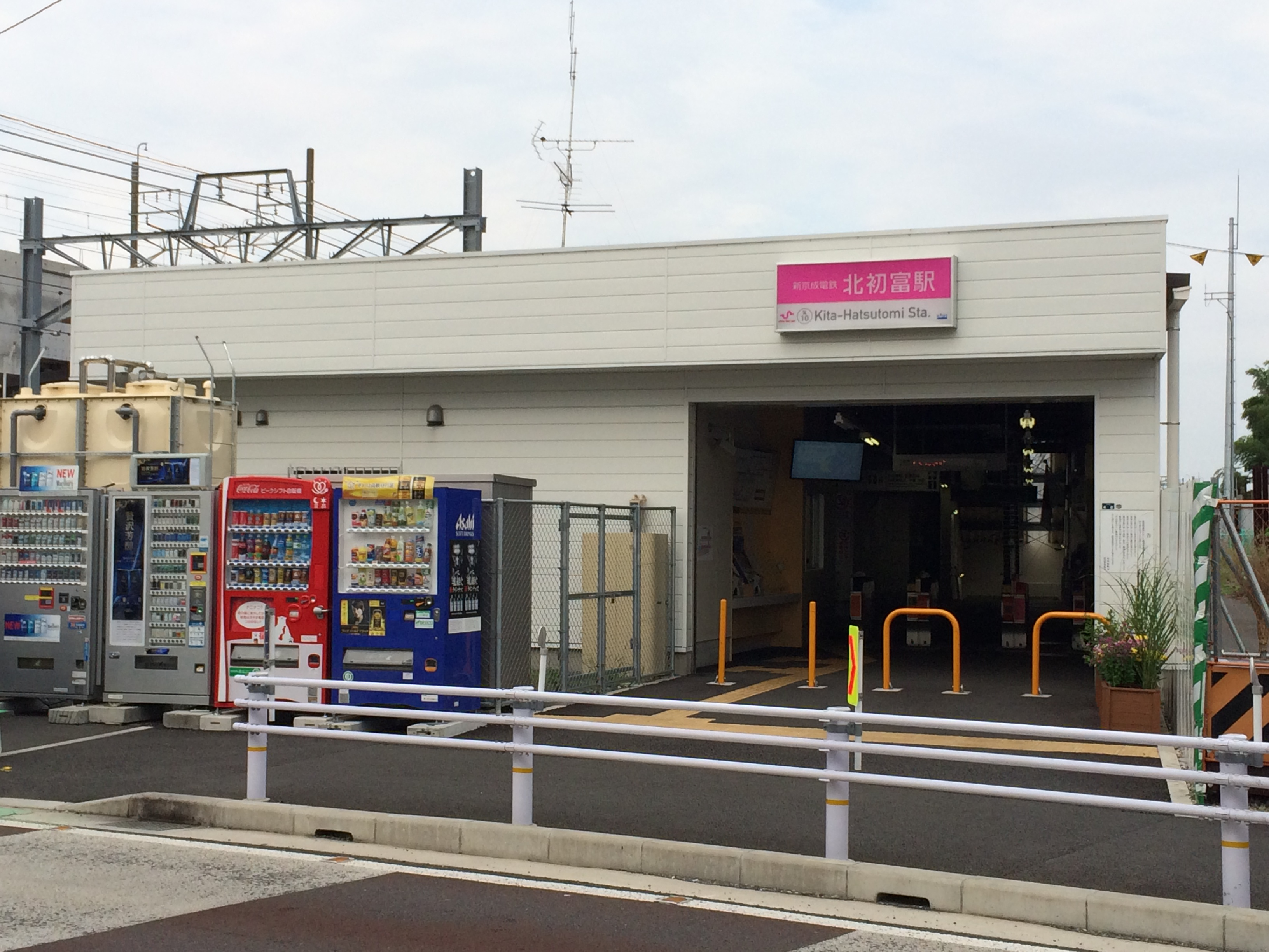 北初富駅仮駅舎